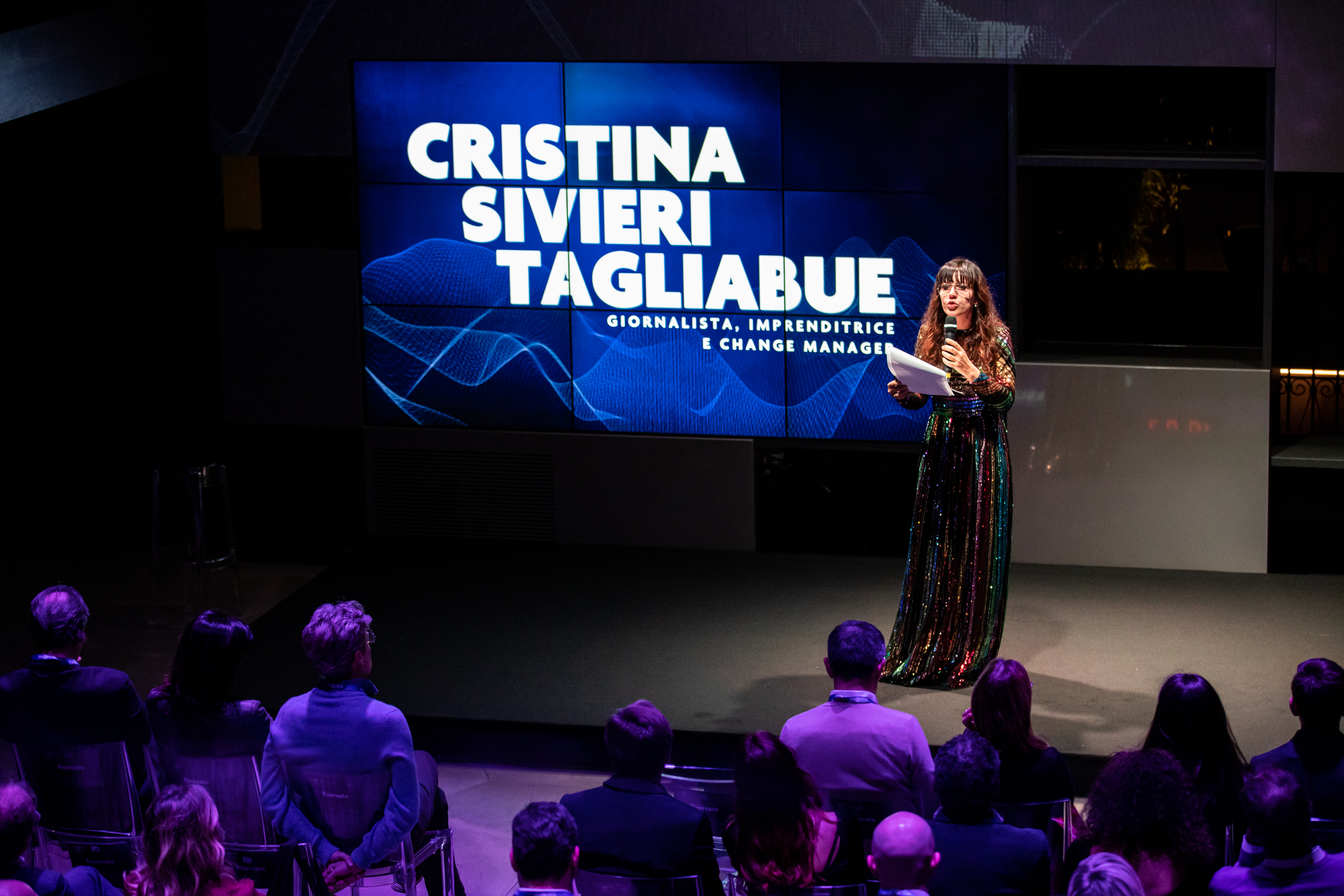 Cristina Sivieri Talgliabue alla "Innovation Night" del 12 dice bra 2019, Milano, Spazio Gessi, nella quale sono stata speaker dell'intervento "Senti Chi Parla, adesso", diventato parte del libro "Parlo quindi Sono"